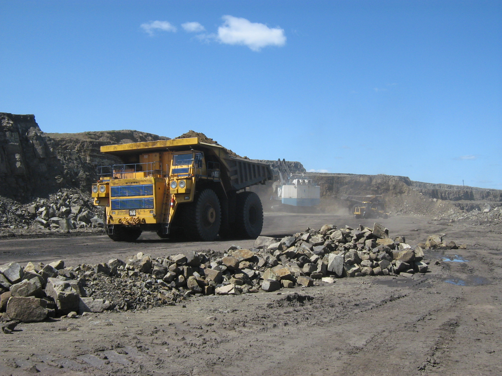 Автор: Светлана Иванова